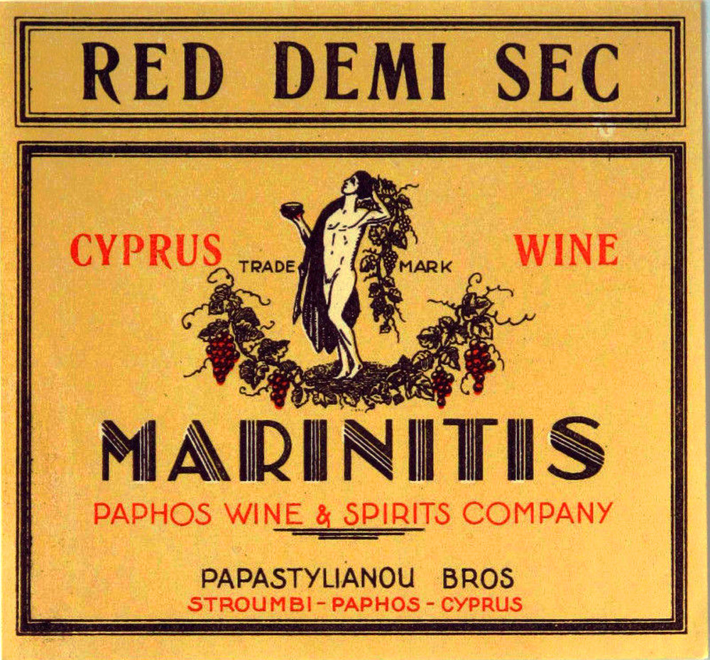 Étiquette d'un vin rouge de Chypre en 1940